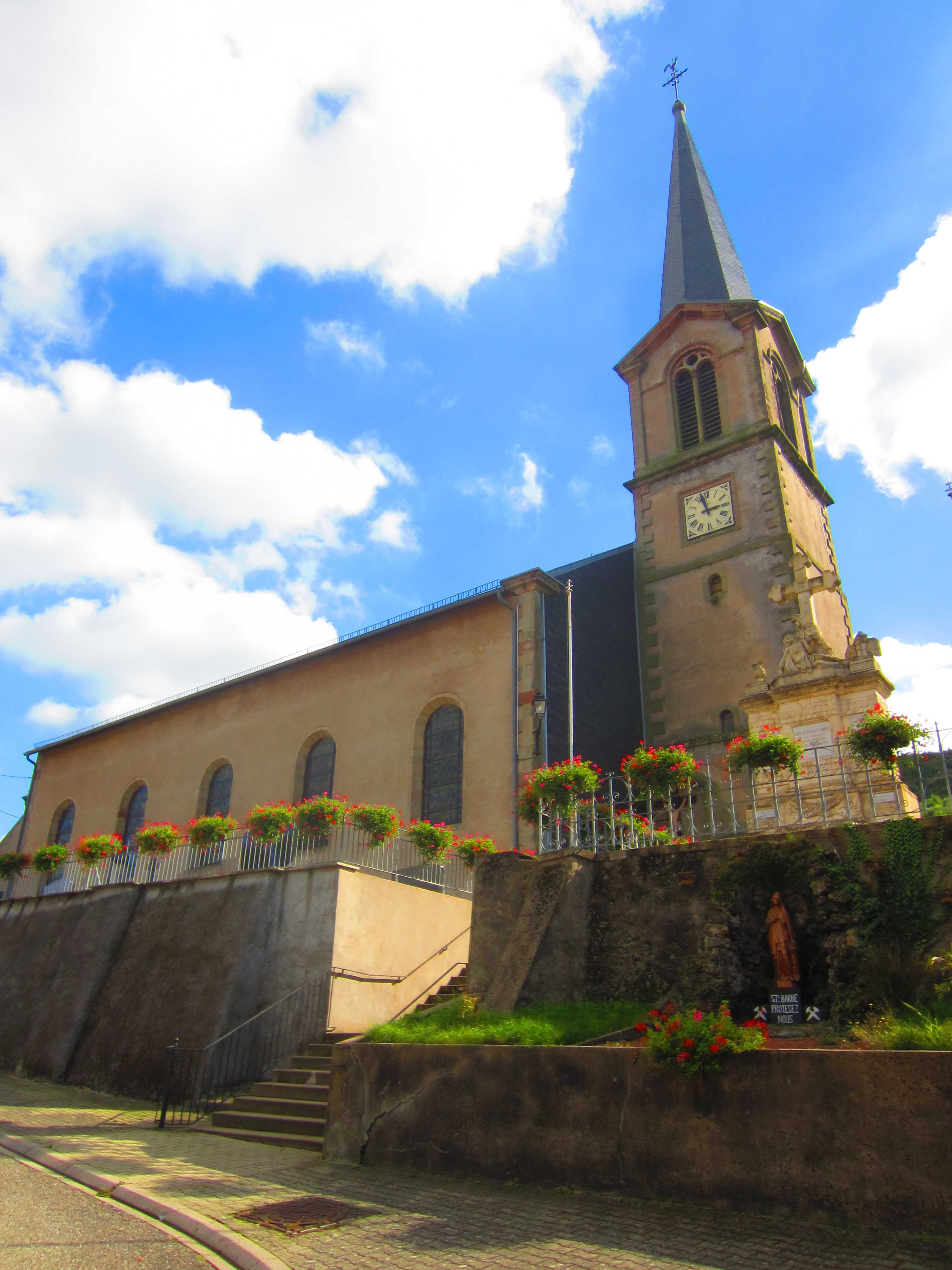 Eglise de Hargarten aux mines